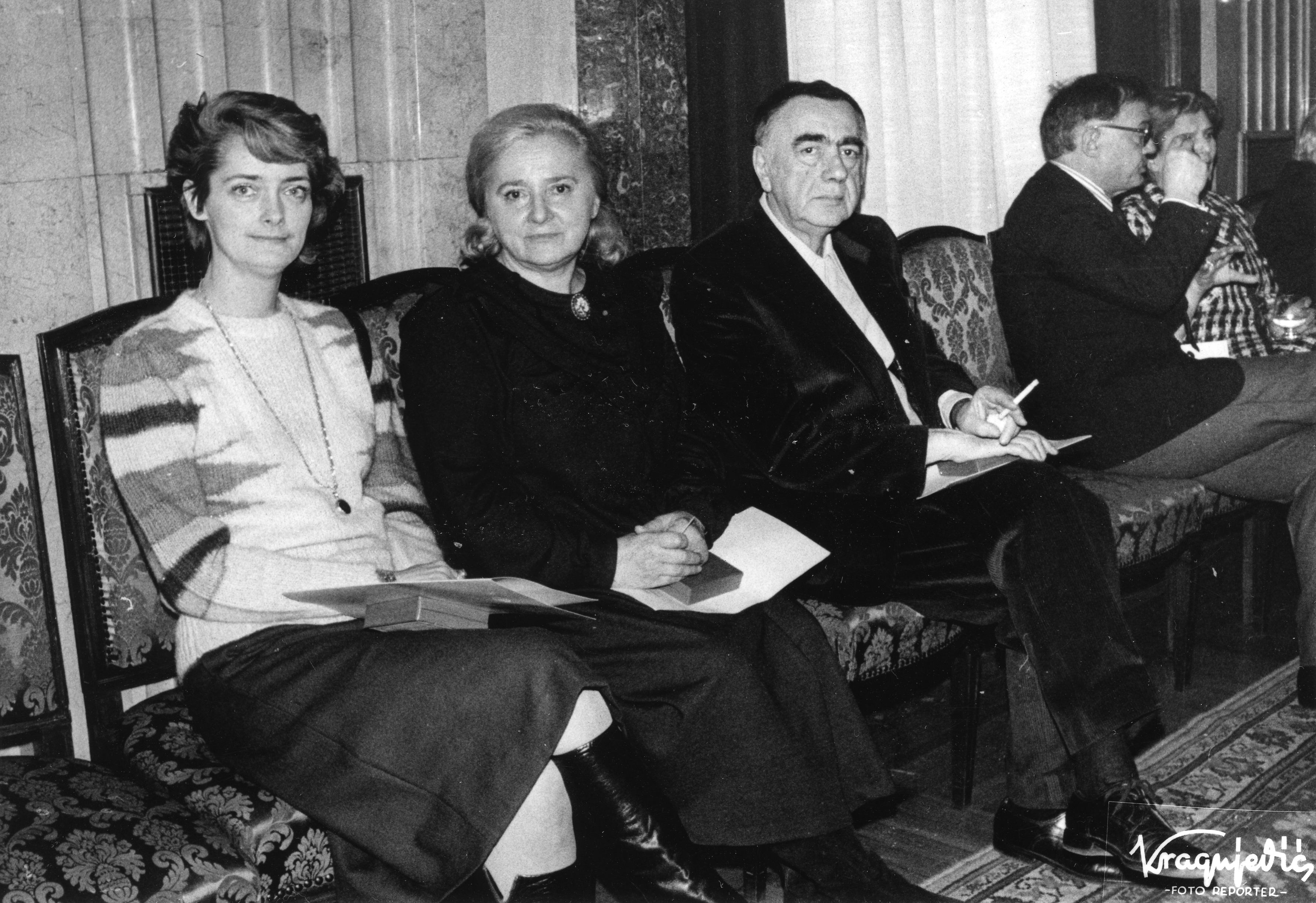 Pesnici Vasko Popa,Mira Alečković,Tanja Kragujević, Jubilarna plaketa grada Beograda 1944-1984. Autor fotografije Stevan Kragujević (po odobrenju Tanje Kragujević)